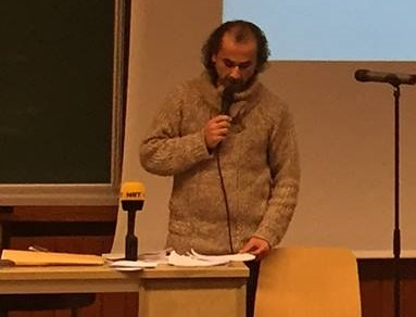 Adnan Adil le 15 décembre 2015